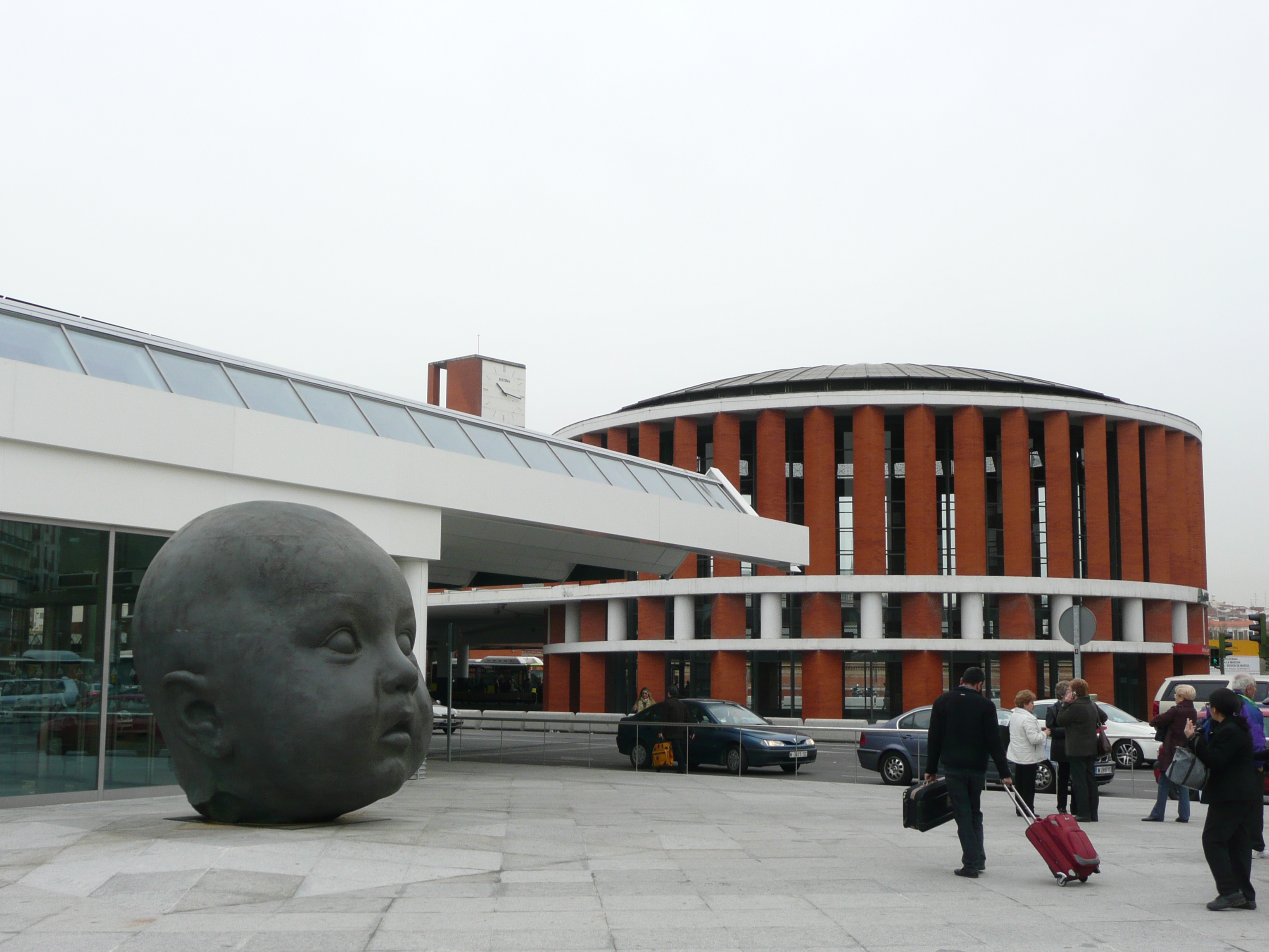 Madrid, Estación de Atocha: Día, de Antonio López García.